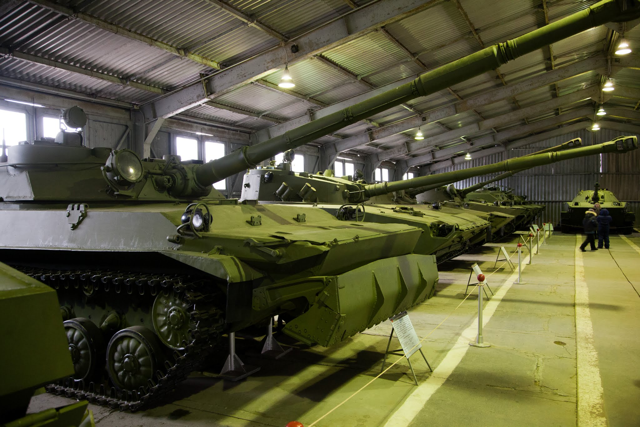 Опытный лёгкий танк "Объект 934" в Бронетанковом музее г. Кубинка.